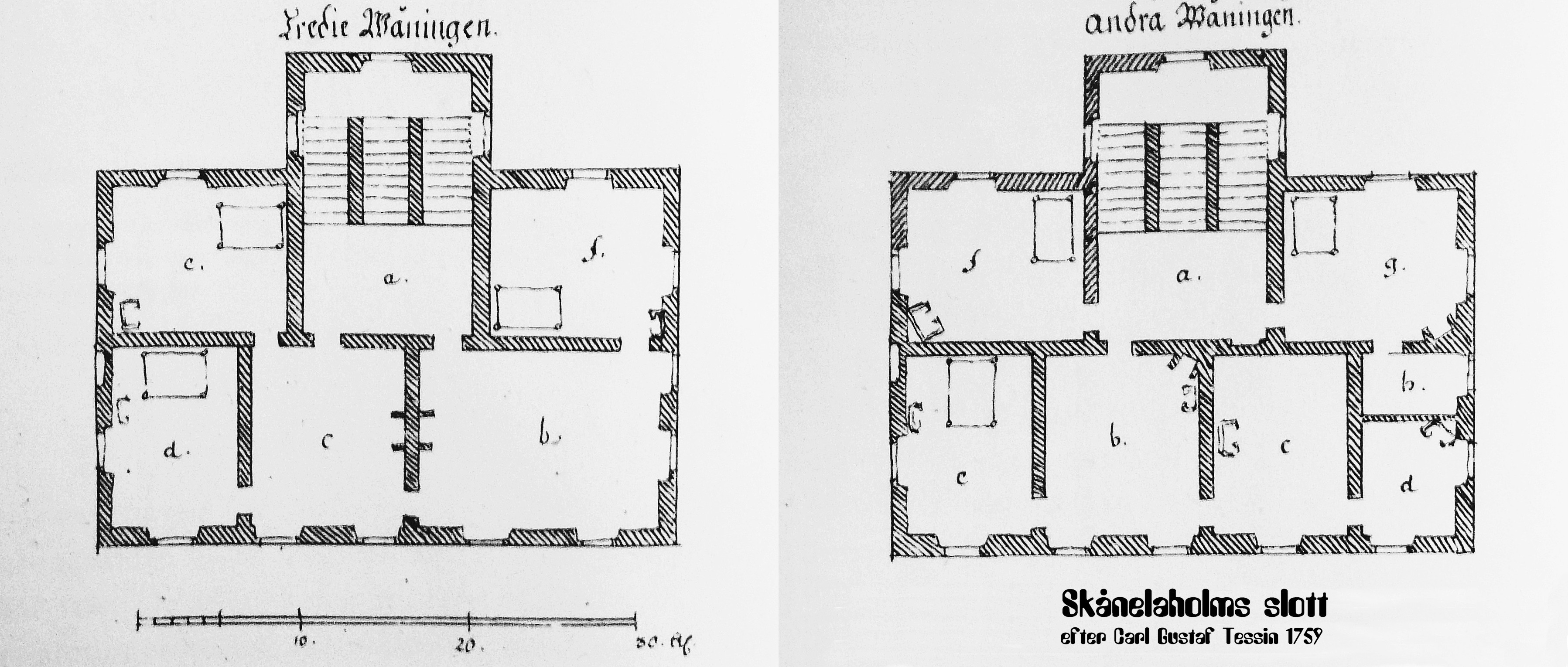 Planritningar till Skånelaholms slott, nedre våning ("andra våningen") och övre våning ("tredje våningen")